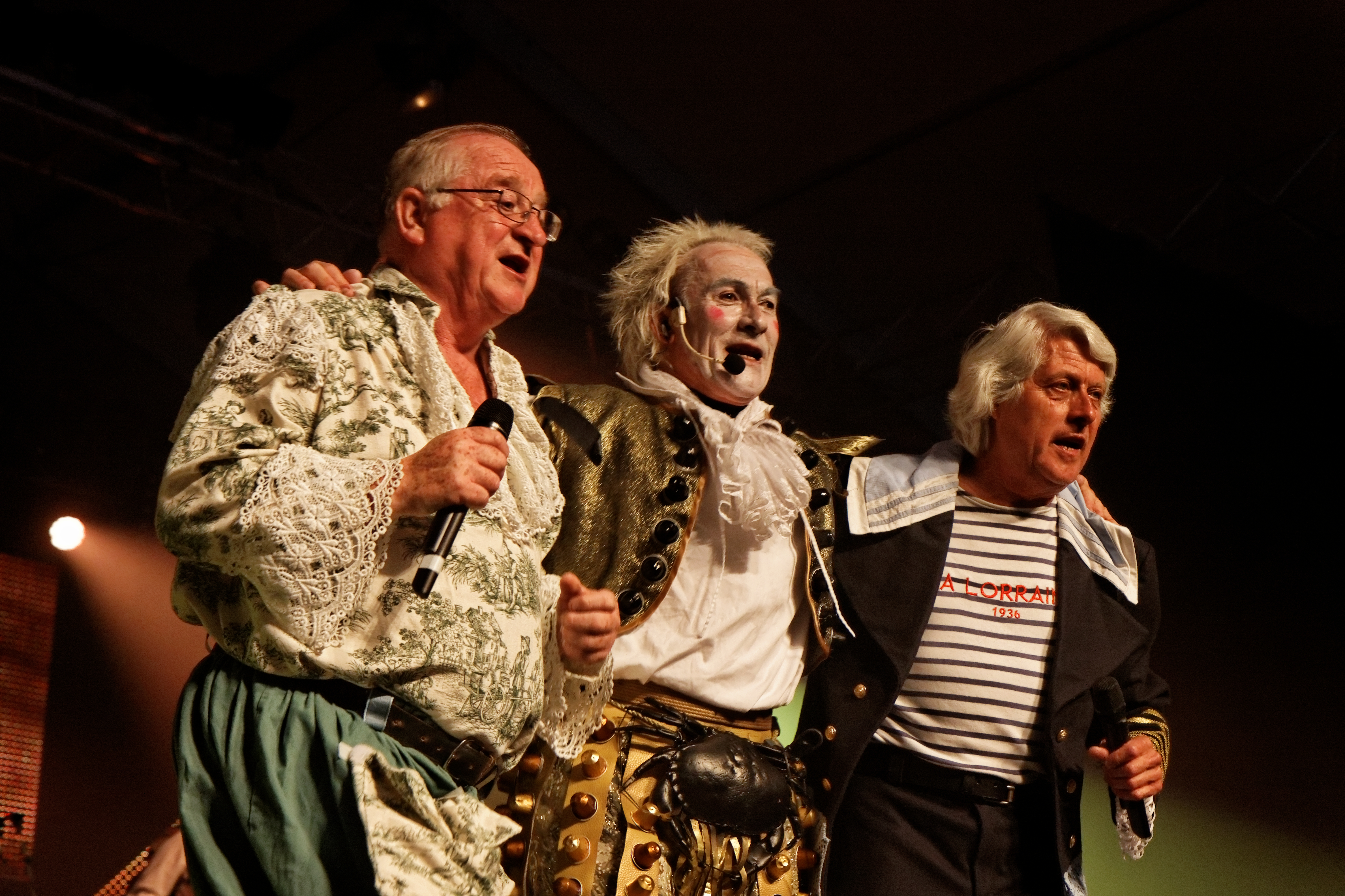 Tri Yann en concert à l'espace Gradlon lors du festival de Cornouaille 2012.